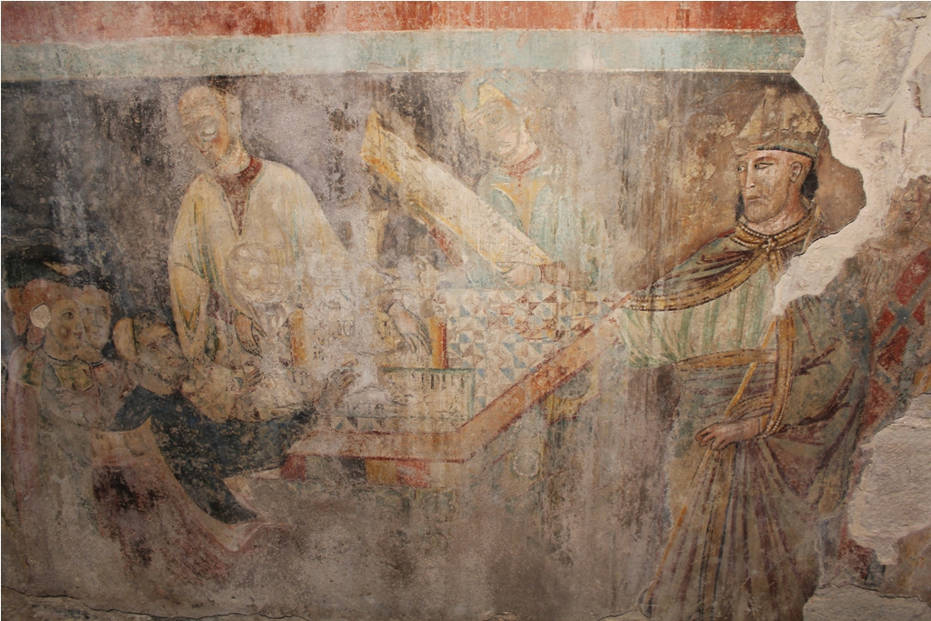 La pace di Berardo Maggi - Salone dei Cavalieri - Broletto - Brescia